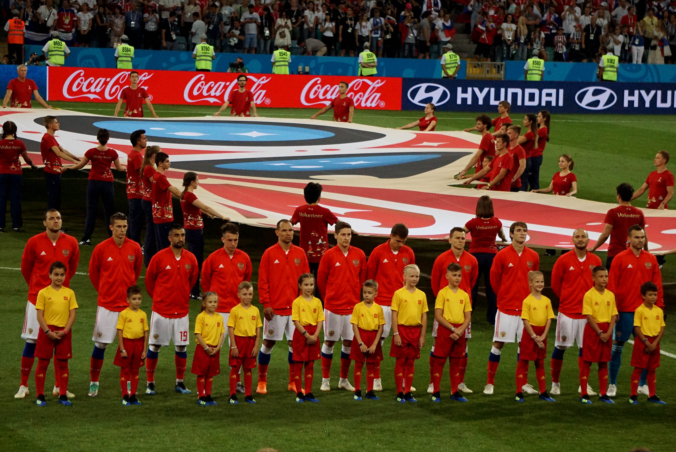 Сборная по футболу России. 7 июля 2018 года сборная Хорватии обыграла сборную России со счётом 2:2 (4:3) по пенальти на ЧМ-2018 на «Фишт»